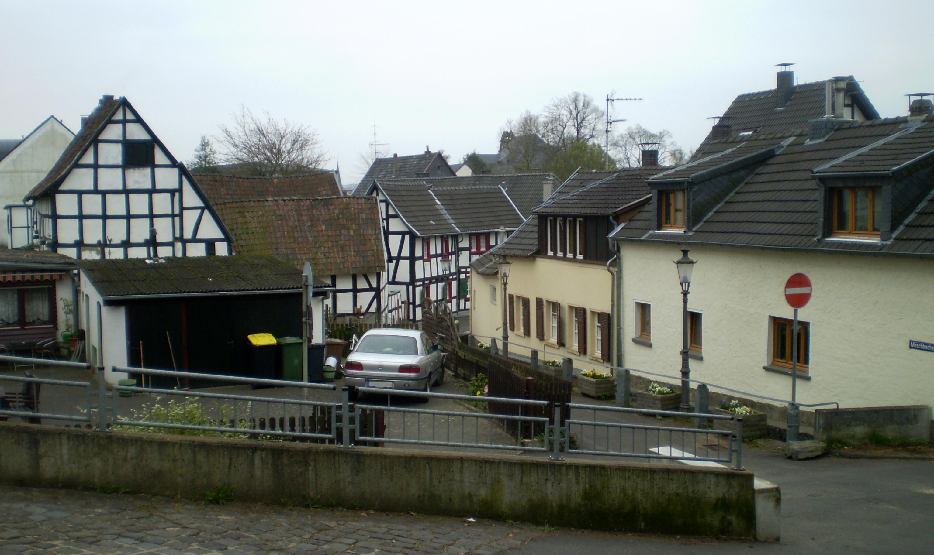 Möschbachstraße, Ortskern von Rommersdorf, Bad Honnef